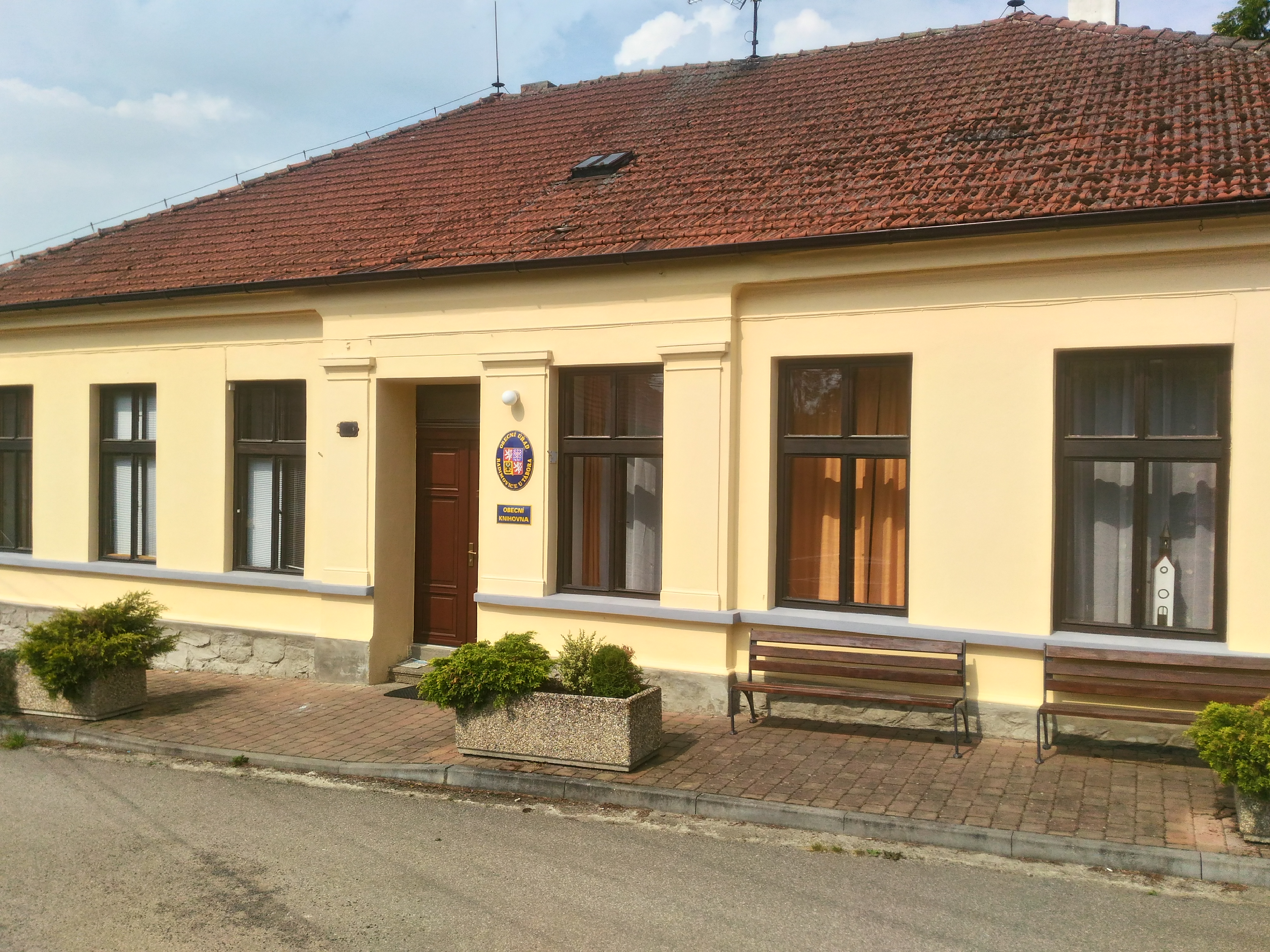 Radimovice u Tábora, okres Tábor, Česká republika